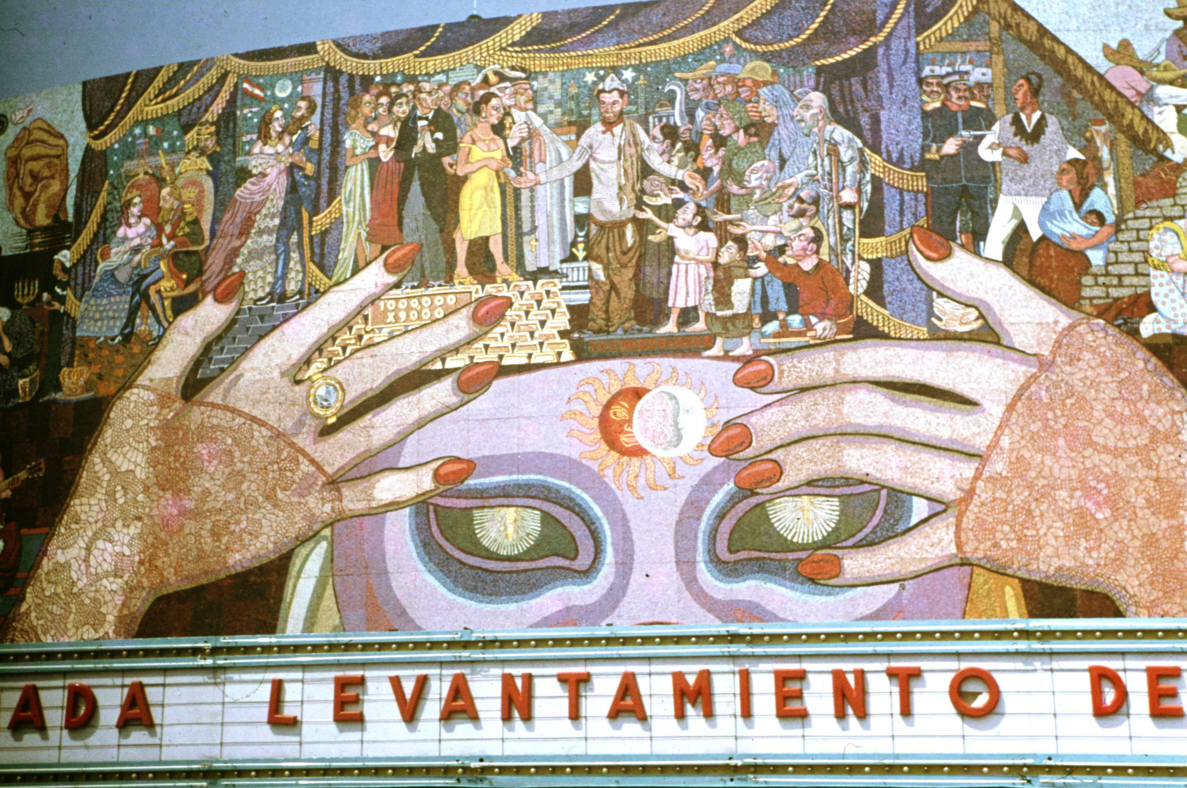 Teatro de los Insurgentes, az olimpiai súlyemelőversenyek helyszíne. Location: Mexico Tags: colorful Title: Teatro de los Insurgentes, az olimpiai súlyemelőversenyek helyszíne.